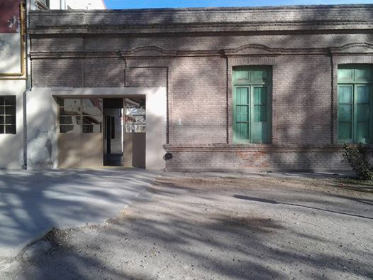 Edificio histórico del Colegio San Miguel, que soportó la inundación del pueblo viejo de General Roca. Hoy Padre Alejandro Stefenelli